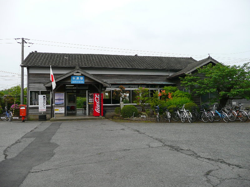 日豊本線今津駅・駅舎 投稿者↑PON（ウエポン）が2007年5月5日に撮影 一部編集の上で2007年5月12日にアップロード